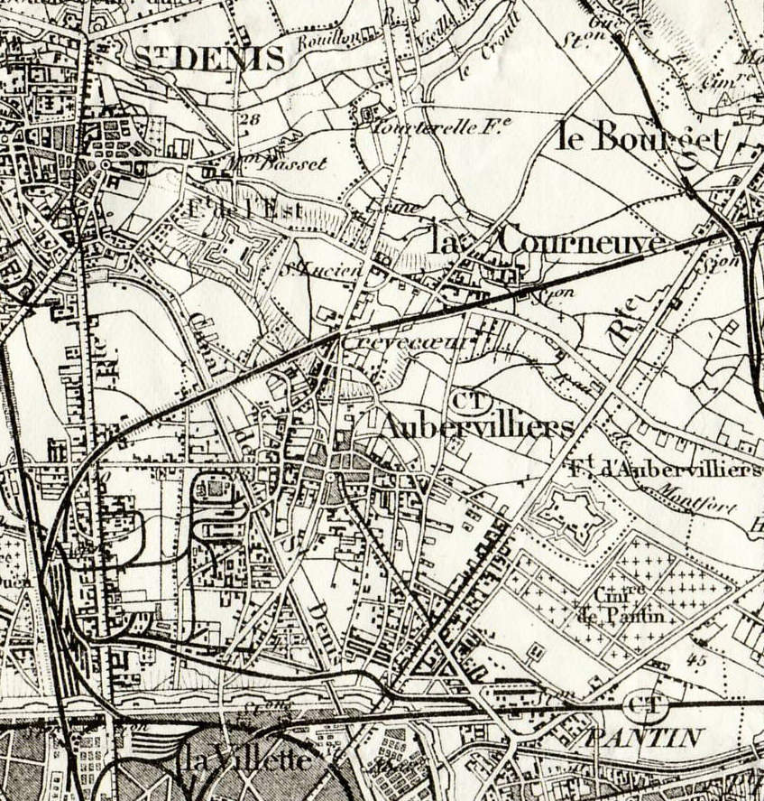 Extrait de la Carte d'état-Major de 1888 (Paris SE) au 1/80000 scannée à 300 dpi (1888) enregistrée au format PNG